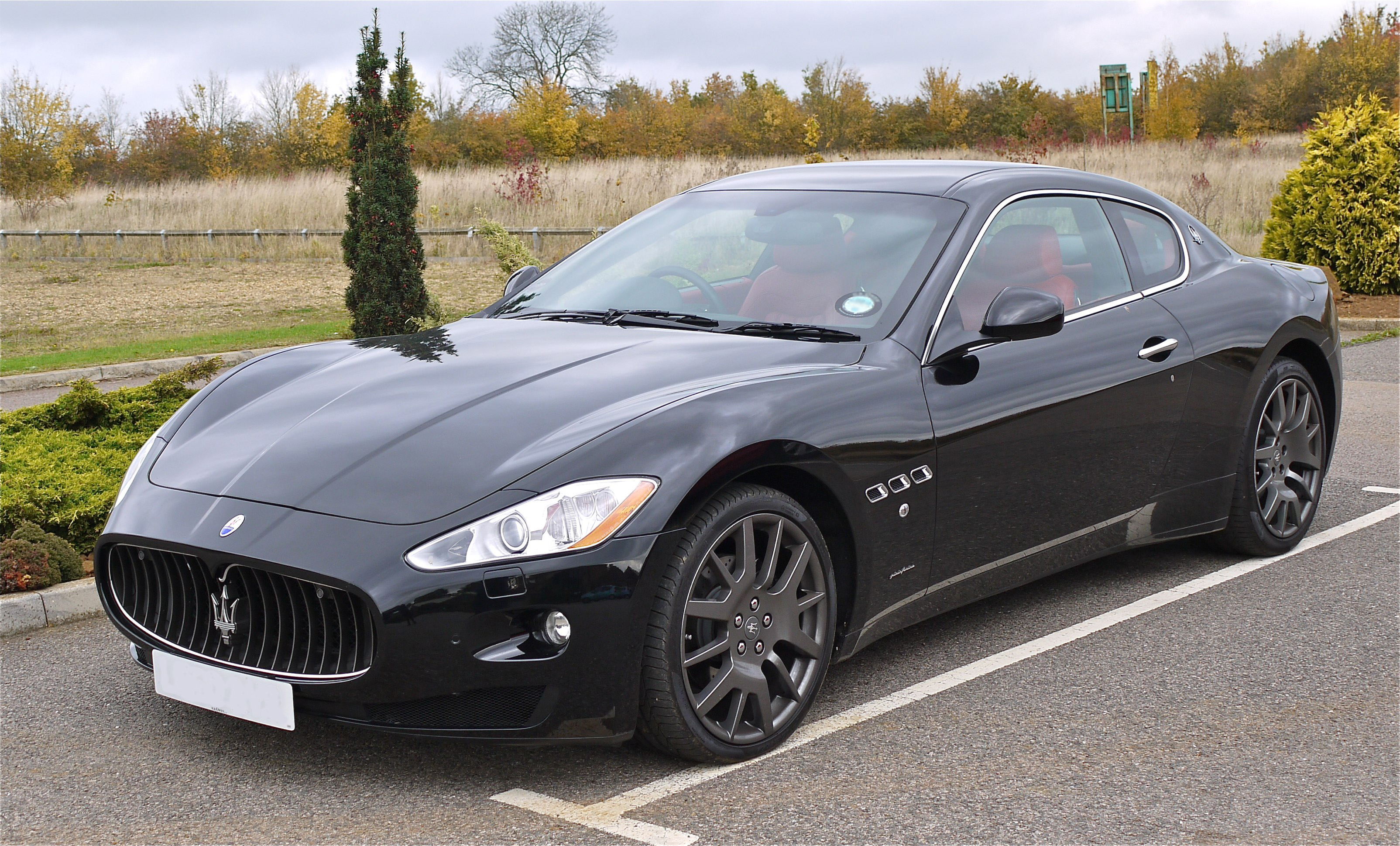 Maserati Gran Turismo V8